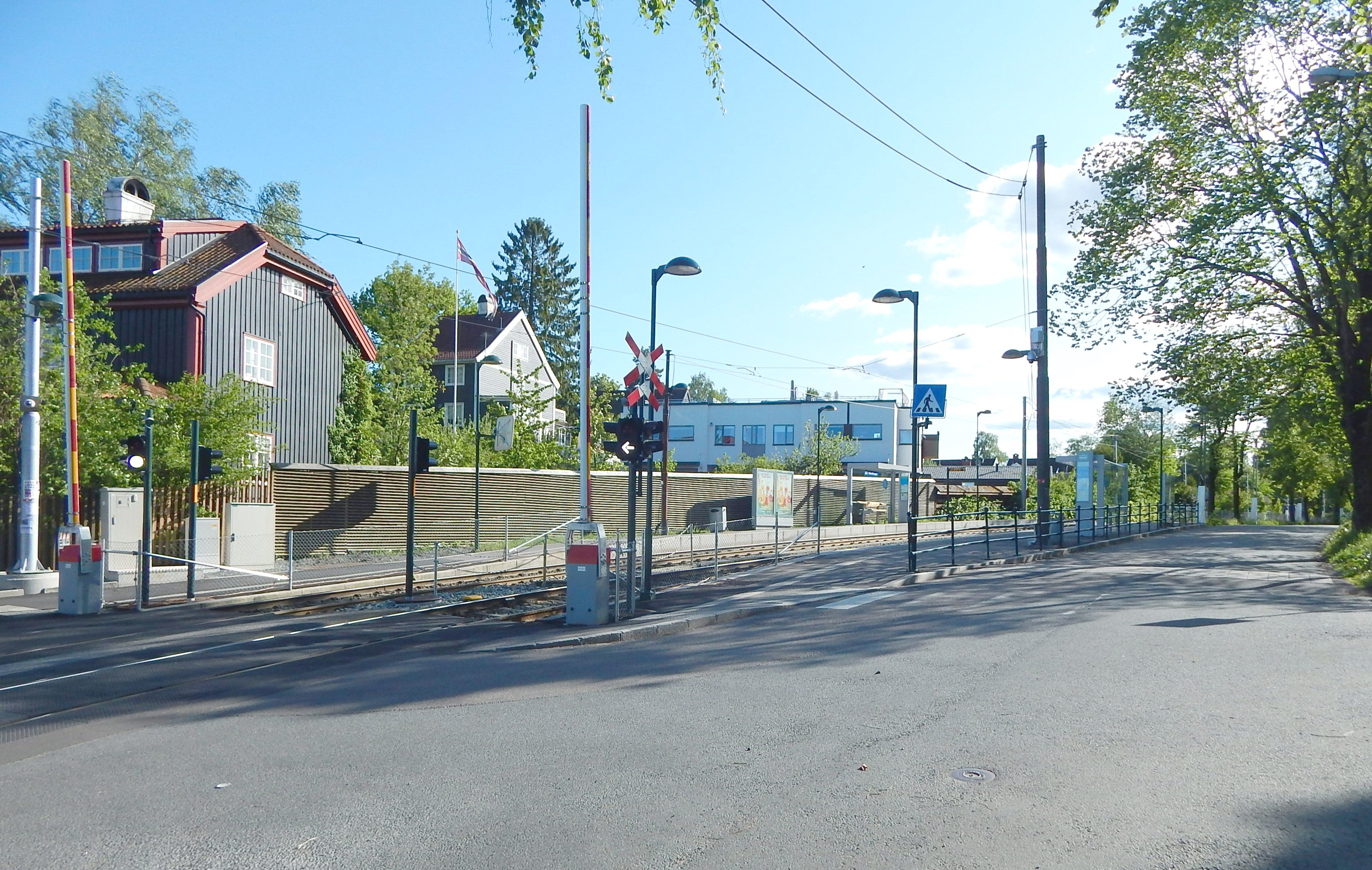 Sankt Edmunds vei. Abbediengen holdeplass til venstre.